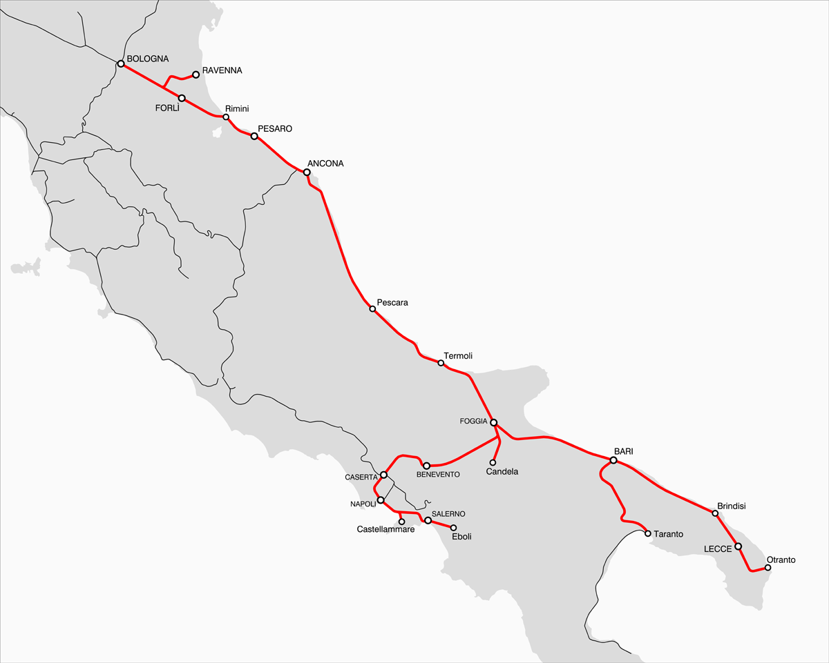 La rete ferroviaria gestita dalla Società Italiana per le Strade Ferrate Meridionali al 1° gennaio 1873.